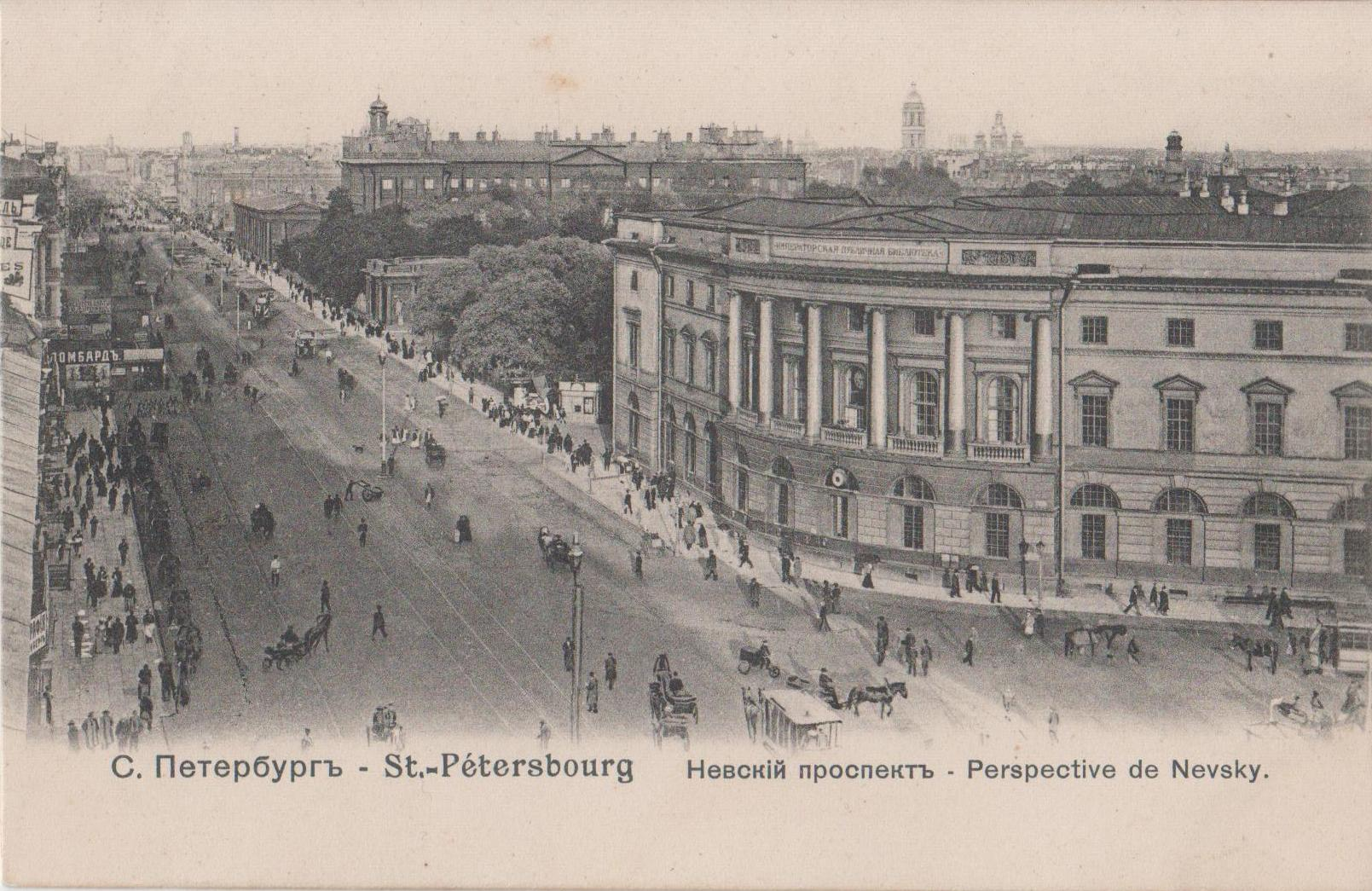 Открытка изд-ва «Ришар», Санкт-Петербург, №0523, Невский проспект